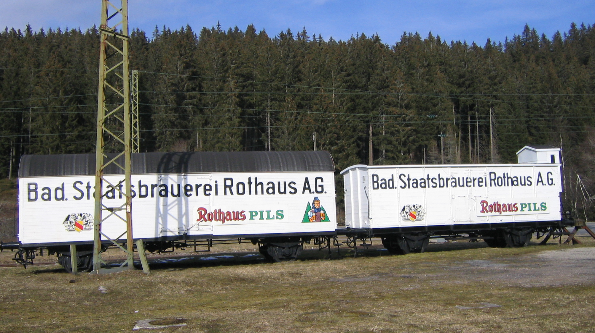 Eisenbahn-Bierkühlwagen der Badischen Staatsbrauerei Rothaus, links Wagen unbekannter Herkunft, rechts ehem. Privatgüterwagen ex DB 546062P (Waggonfabrik Fuchs 1927) in Seebrugg (Permanentwerbung)